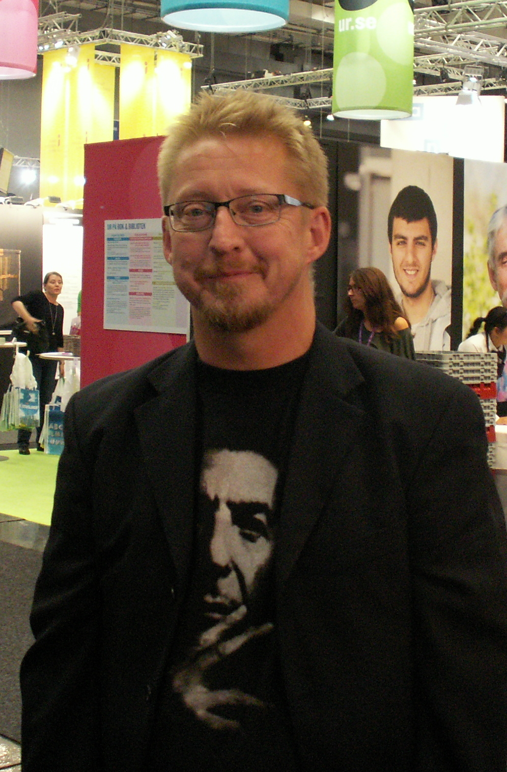 Mikael Thörnqvist på Bokmässan i Göteborg 2014.